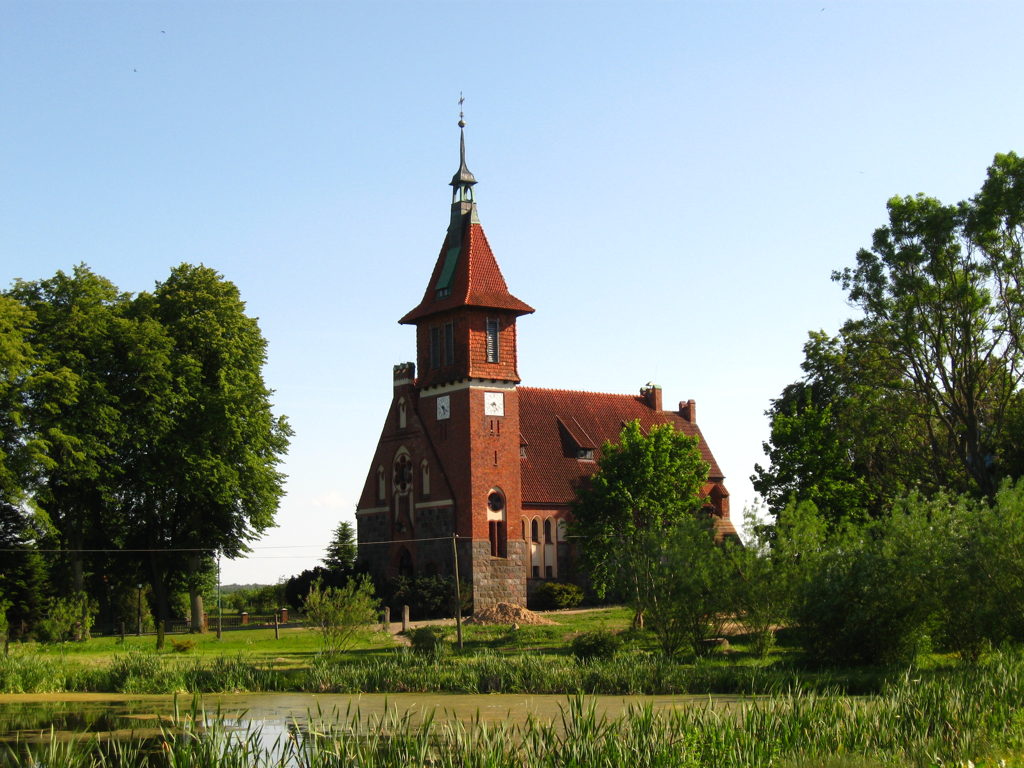 Mierzeszyn - kościół ewangelicki z cmentarzem